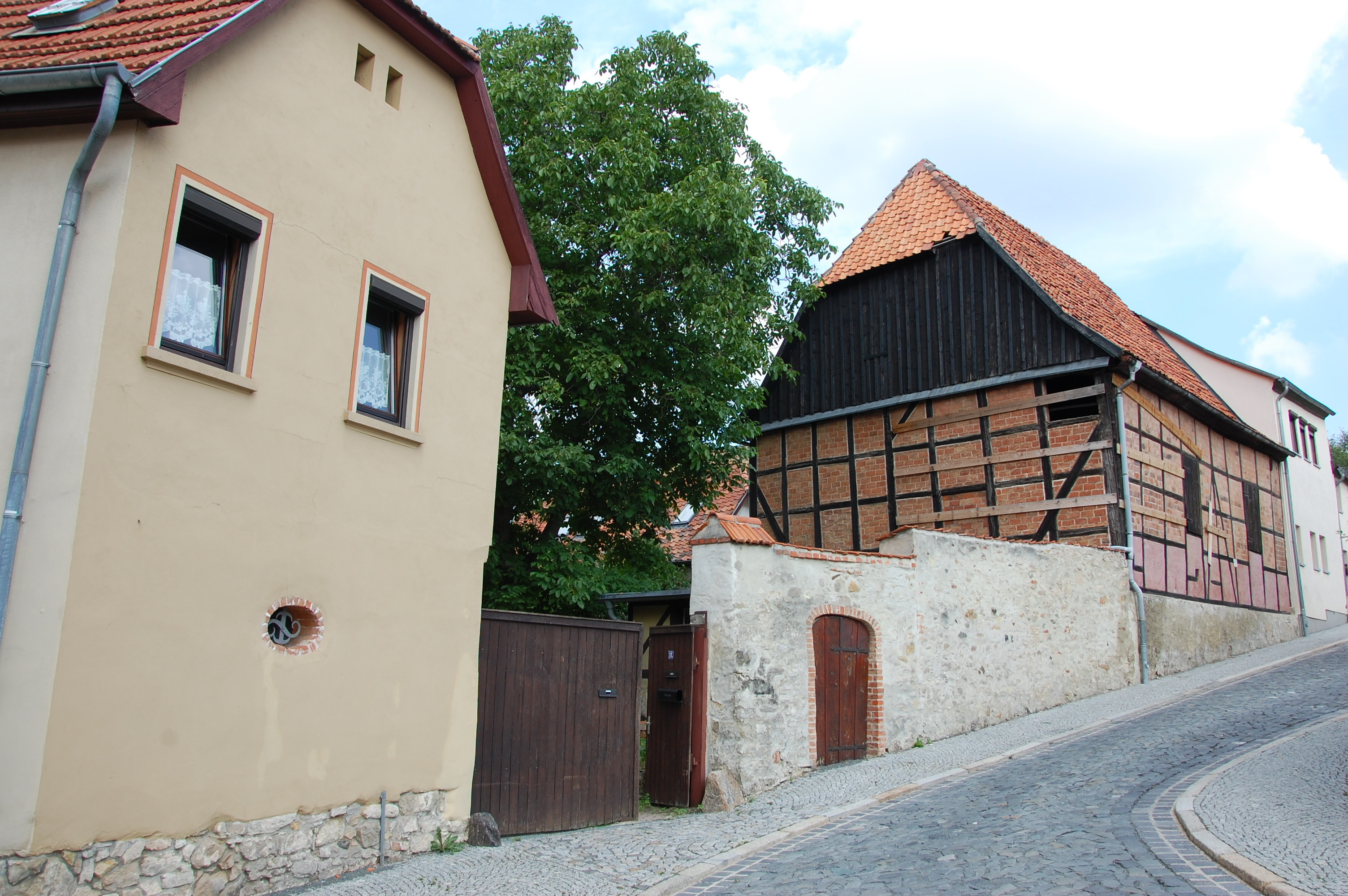 Haus Bergstraße 18 in Gernrode